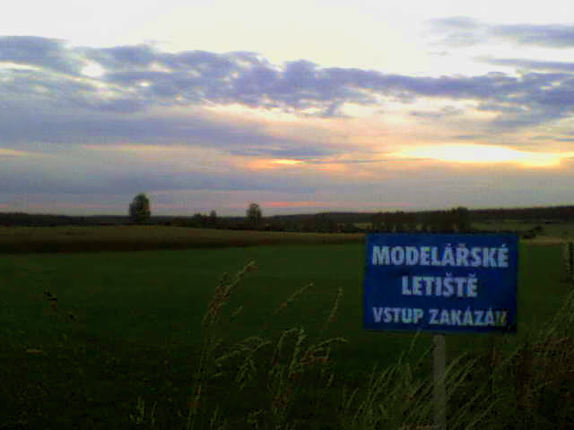 Velká Dobrá - modellers' airport